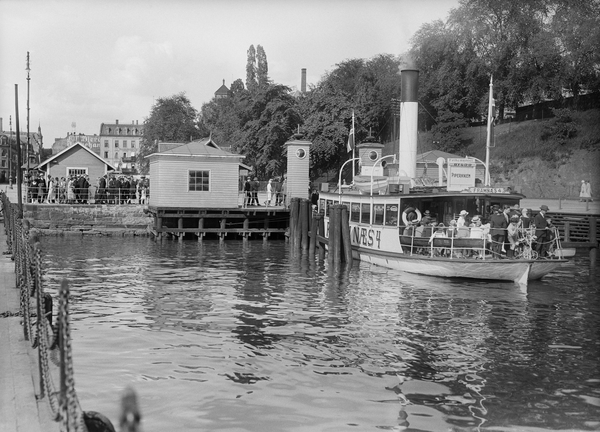 Framnæs 4 ved Piperviksbryggene i Oslo. Bildet er tatt i 1926.